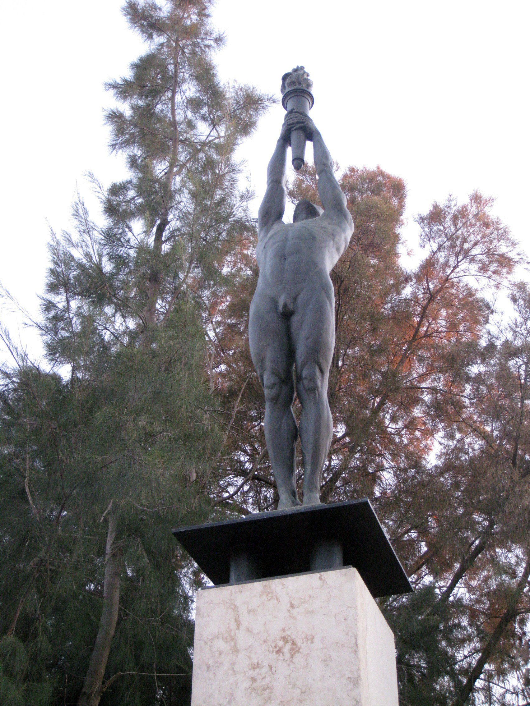 A Ferrer i Guàrdia (Auguste Puttemans). Av. de l'Estadi, accés al Palau Nacional (Barcelona)